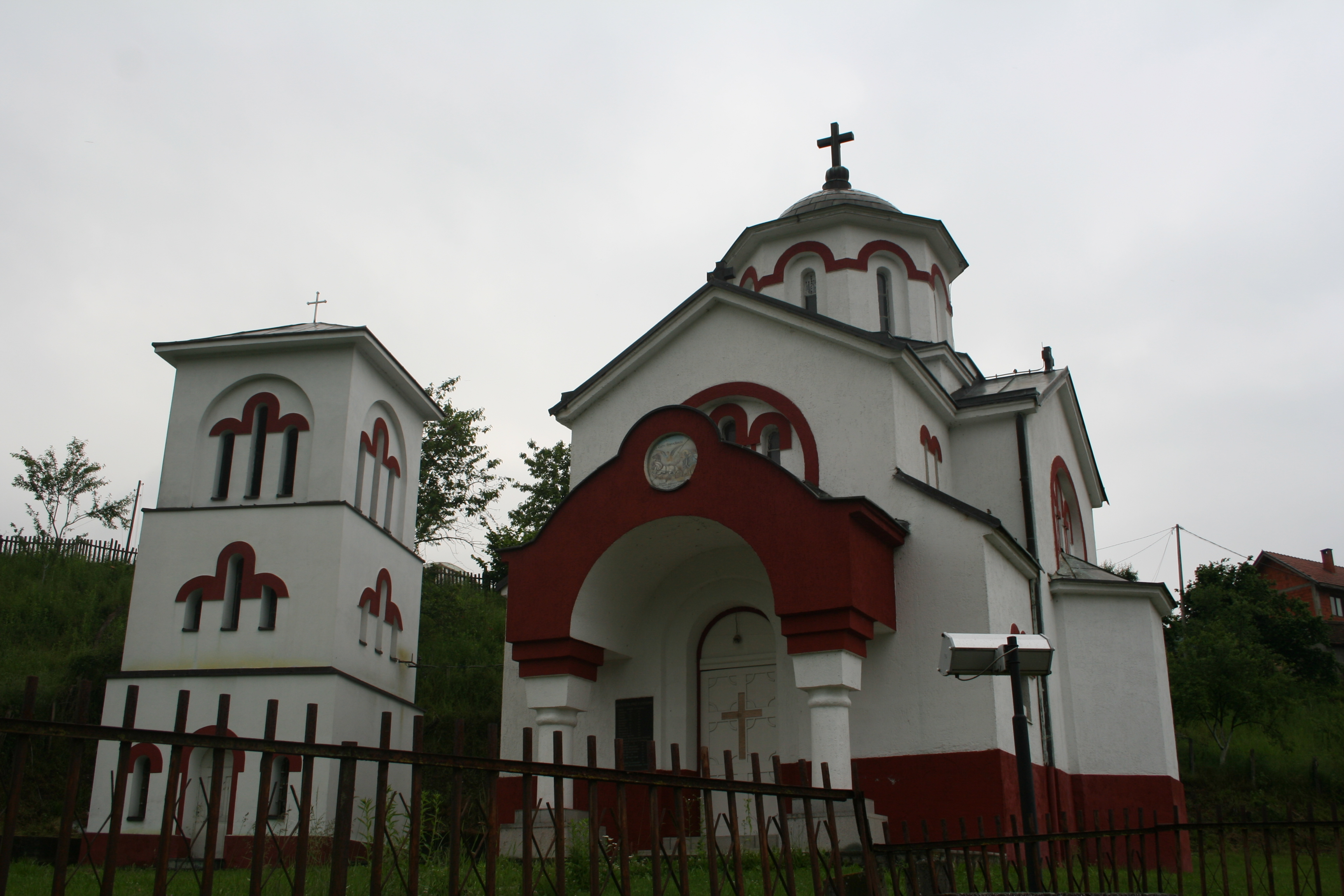 Crkva Sv. proroka Ilije, Bačevci